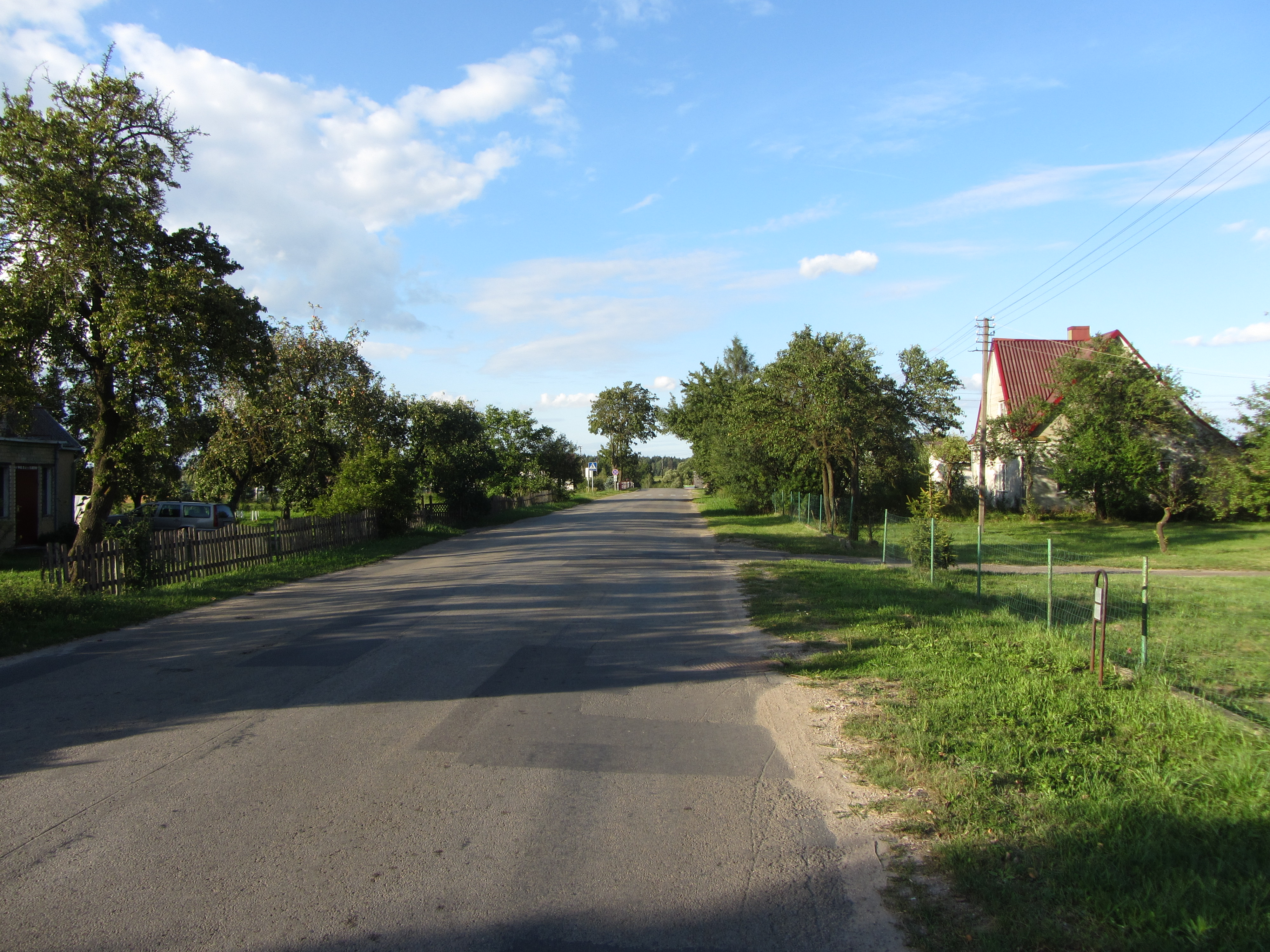 Alesninkai, Lithuania